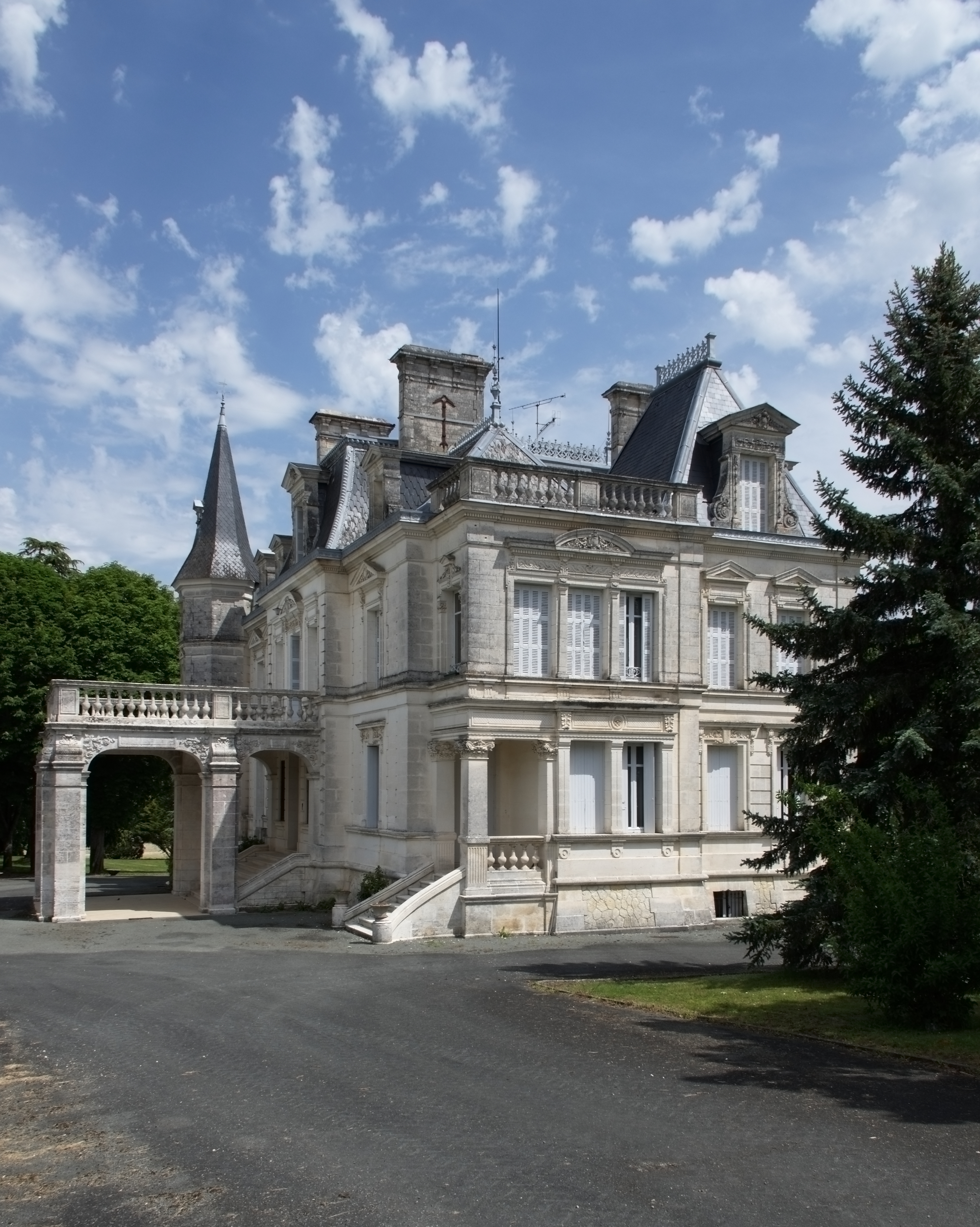 Château du Janvray (1895-1900), commune de Laprade, Charente, France.